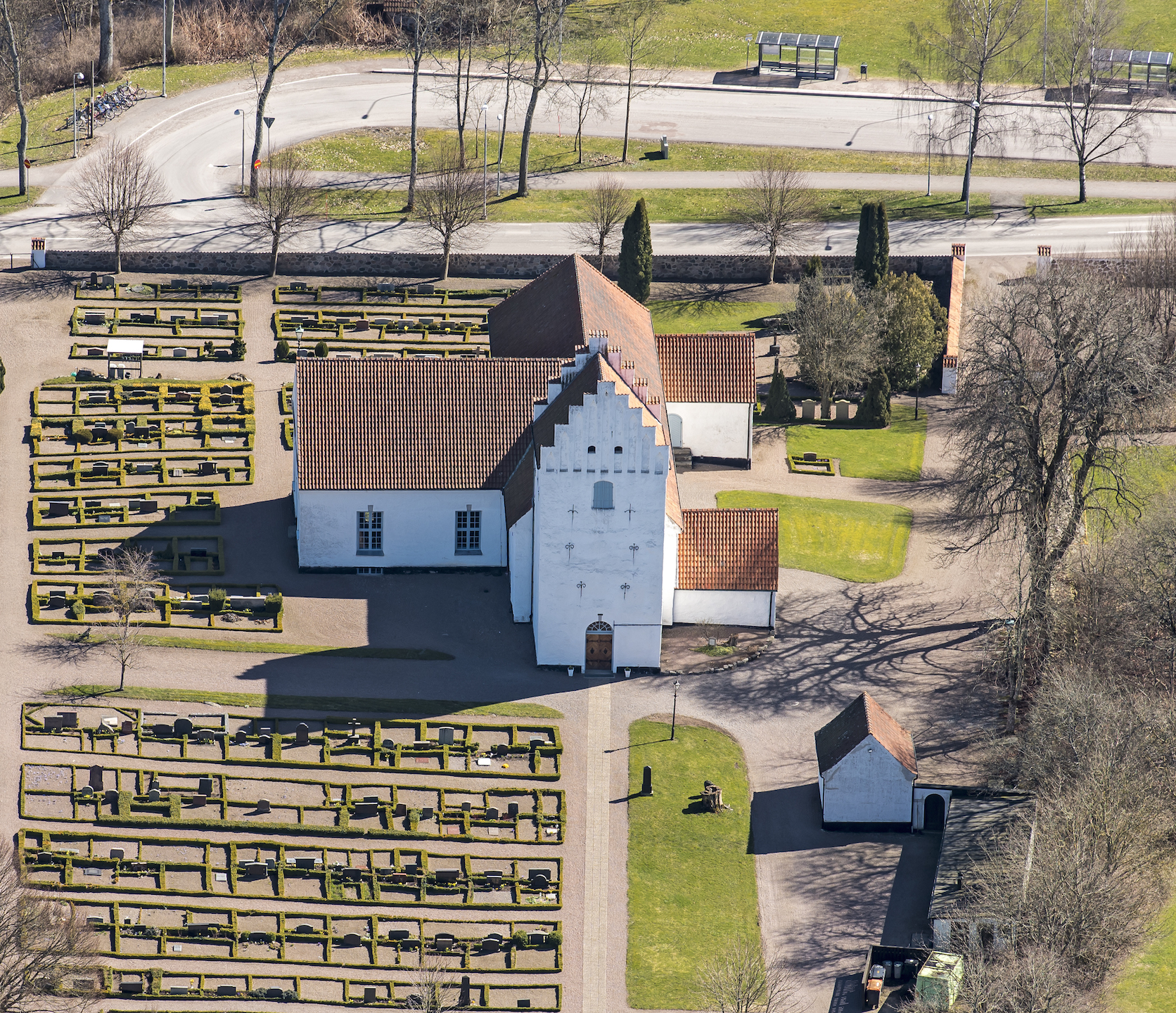 Kågeröds kyrka